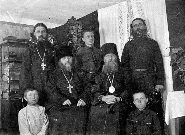 В первом ряду сидят: епископ Любимский Сергий (Мельников), протоиерей Лавр Орлов, настоятель Троицкого храма города Любима. Во втором ряду: слева направо иеромонах Иерофей (Глазков), настоятель Спасо-Введенского храма города Любима, Михаил Гундяев - иподиакон епископа Сергия (отец Святейшего Патриарха Московского и всея Руси Кирилла), иеродиакон Арсений (Гусев). Фотография сделана в городе Любиме Ярославской губернии в 1925 году.